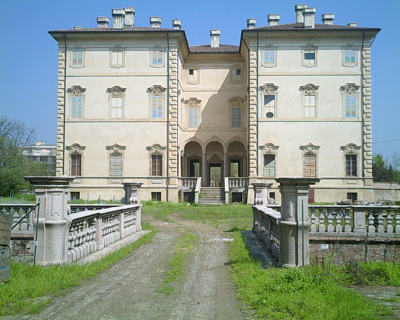 Villa Pallavicino This is a photo of a monument which is part of cultural heritage of Italy.